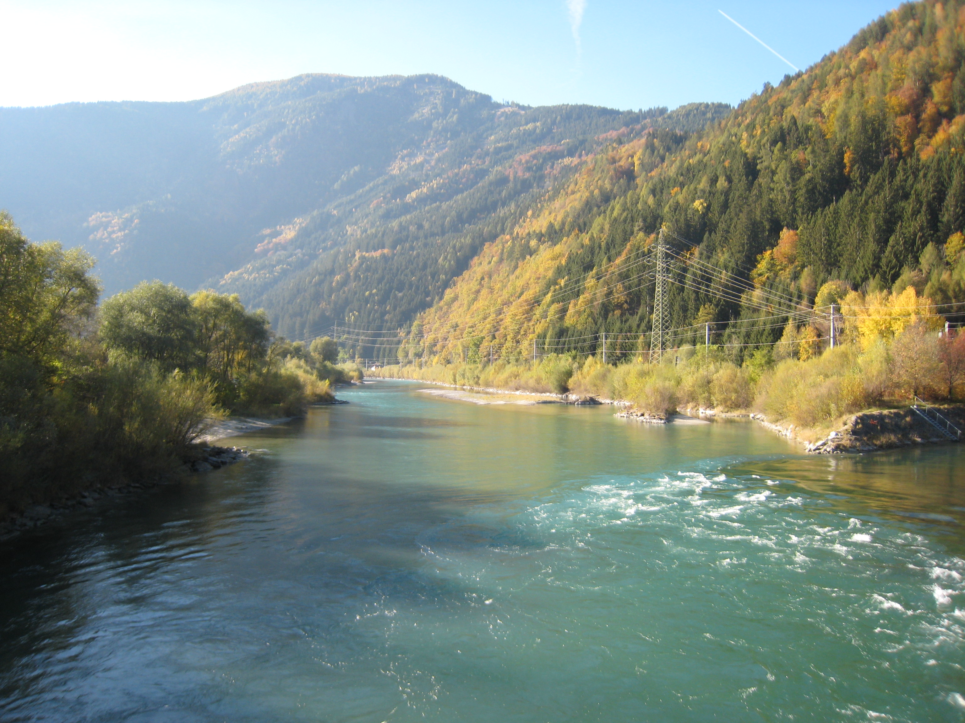 Drau bei Sachsenburg